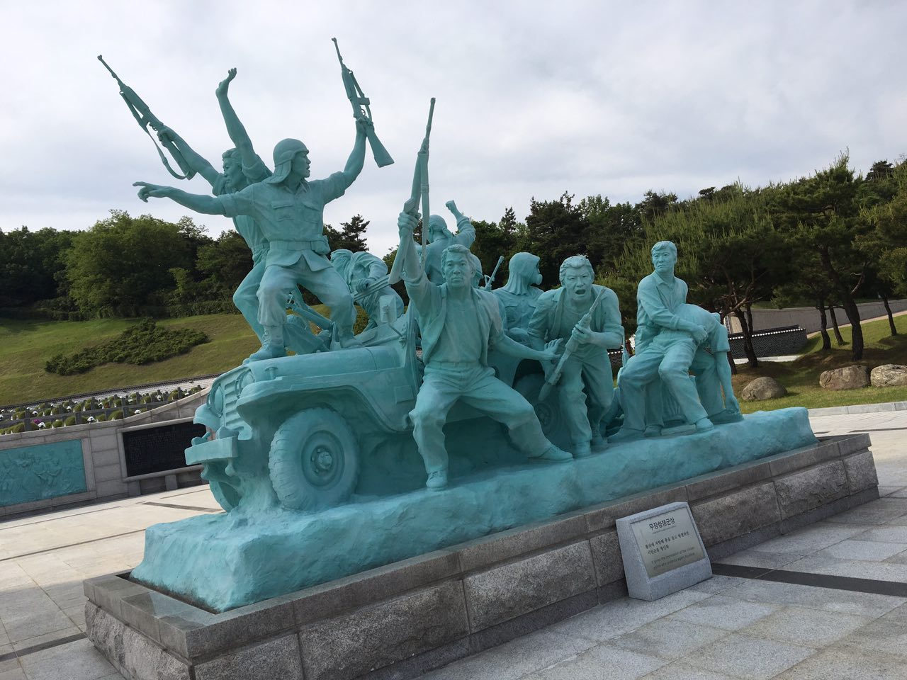 국립 5·18 민주 묘지의 조형물